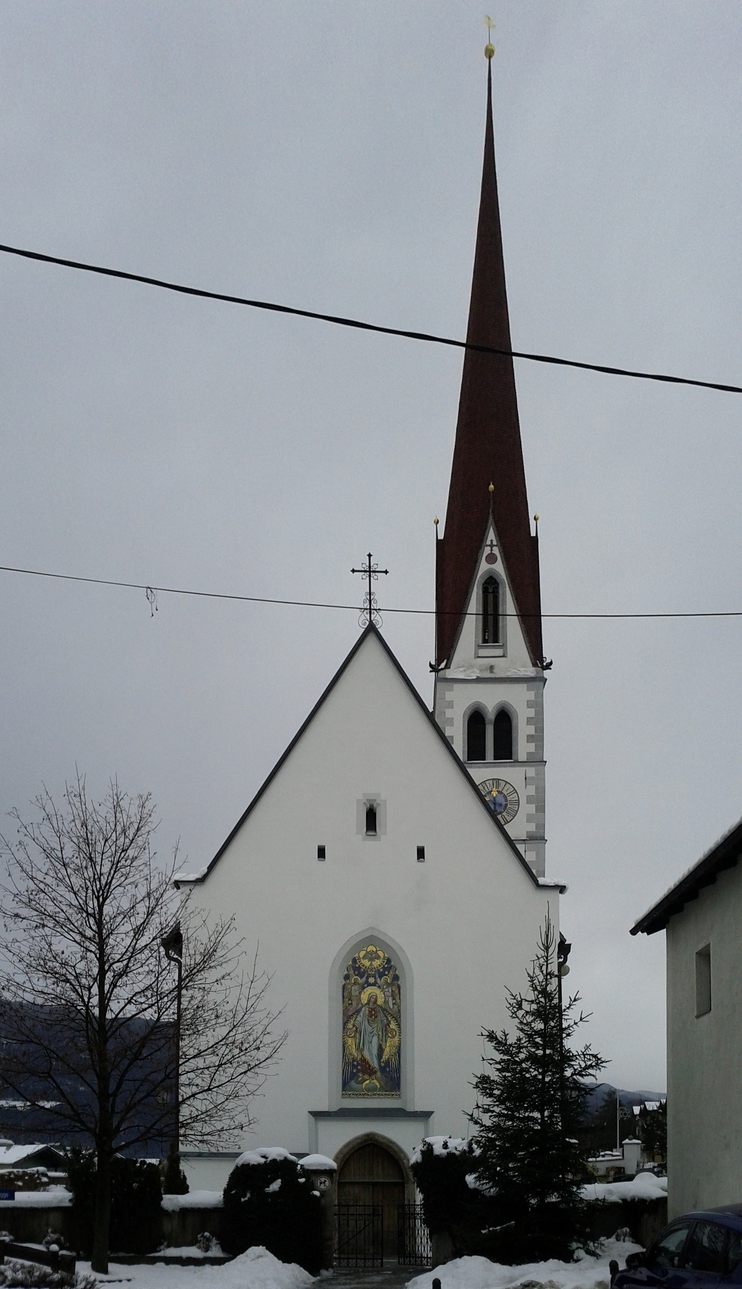 Katholische Pfarrkirche Mariä Himmelfahrt - Pfaffenhofen, Dorfplatz